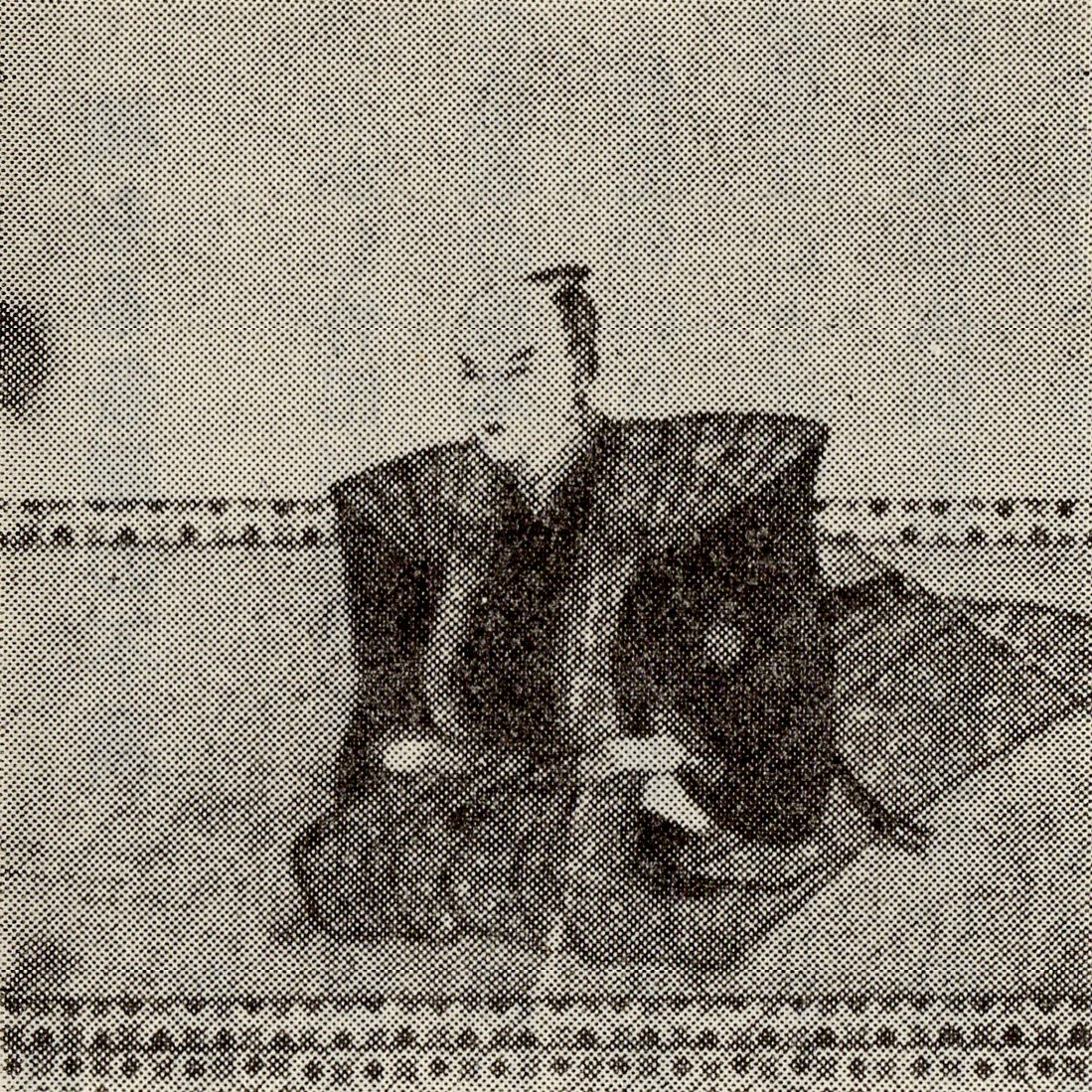 中川久教の肖像(モノクロ)。